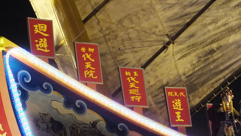 王船船內需要添載生活物資，供官兵使用，而添載物品有五穀雜糧、鍋碗瓢盆、家具等。